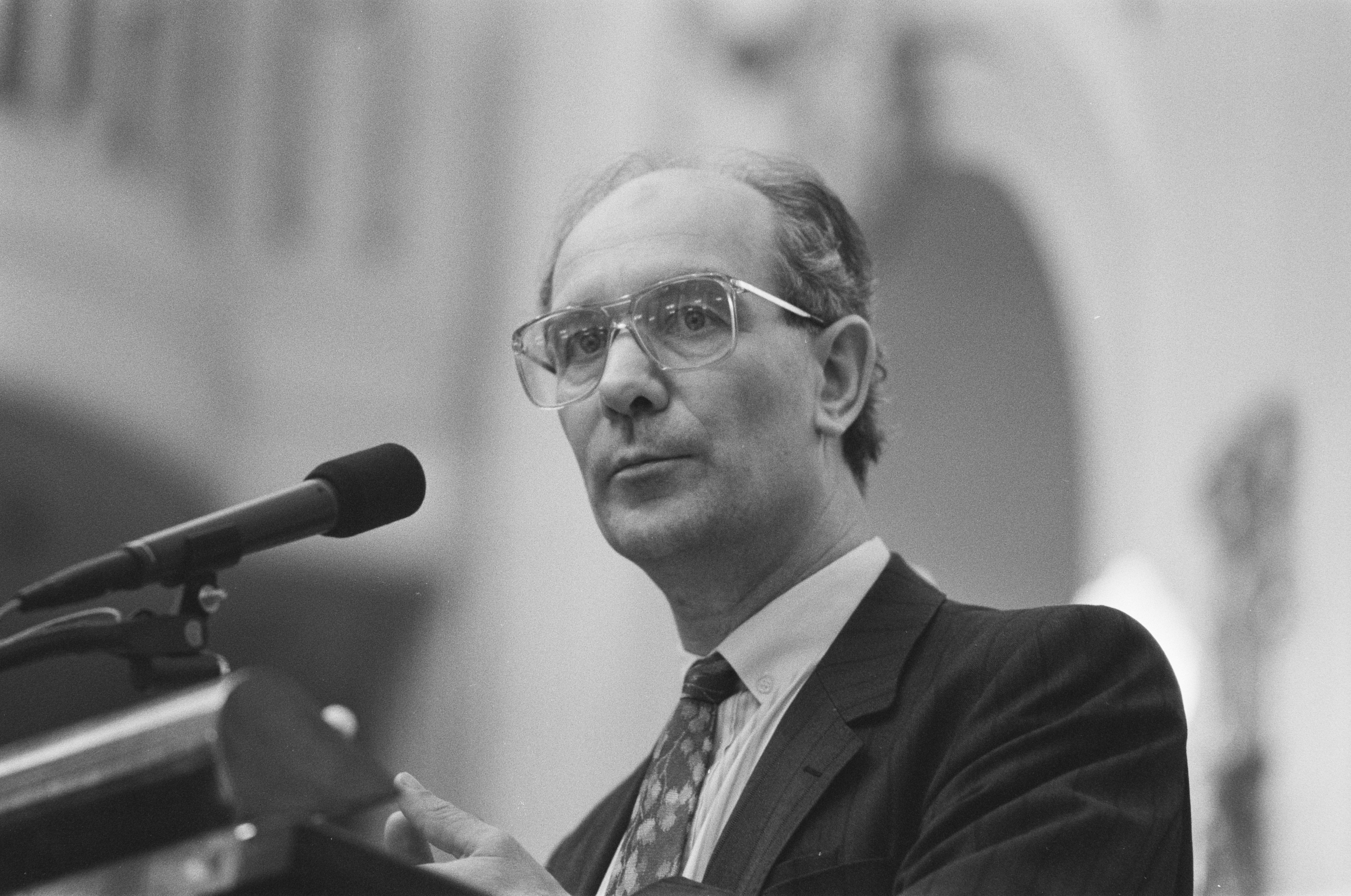 Collectie / Archief : Fotocollectie Anefo Reportage / Serie : [ onbekend ] Beschrijving : Tweede Kamer , debat over bezuinigingsvoorstellen kabinet CDA-fractievoorzitter Bert de Vries aan het woord, close Datum : 28 maart 1988 Trefwoorden : debatten Persoonsnaam : Bert De Vries Instellingsnaam : Tweede Kamer Fotograaf : Bogaerts, Rob / Anefo Auteursrechthebbende : Nationaal Archief Materiaalsoort : Negatief (zwart/wit) Nummer archiefinventaris : bekijk toegang 2.24.01.05 Bestanddeelnummer : 934-2197